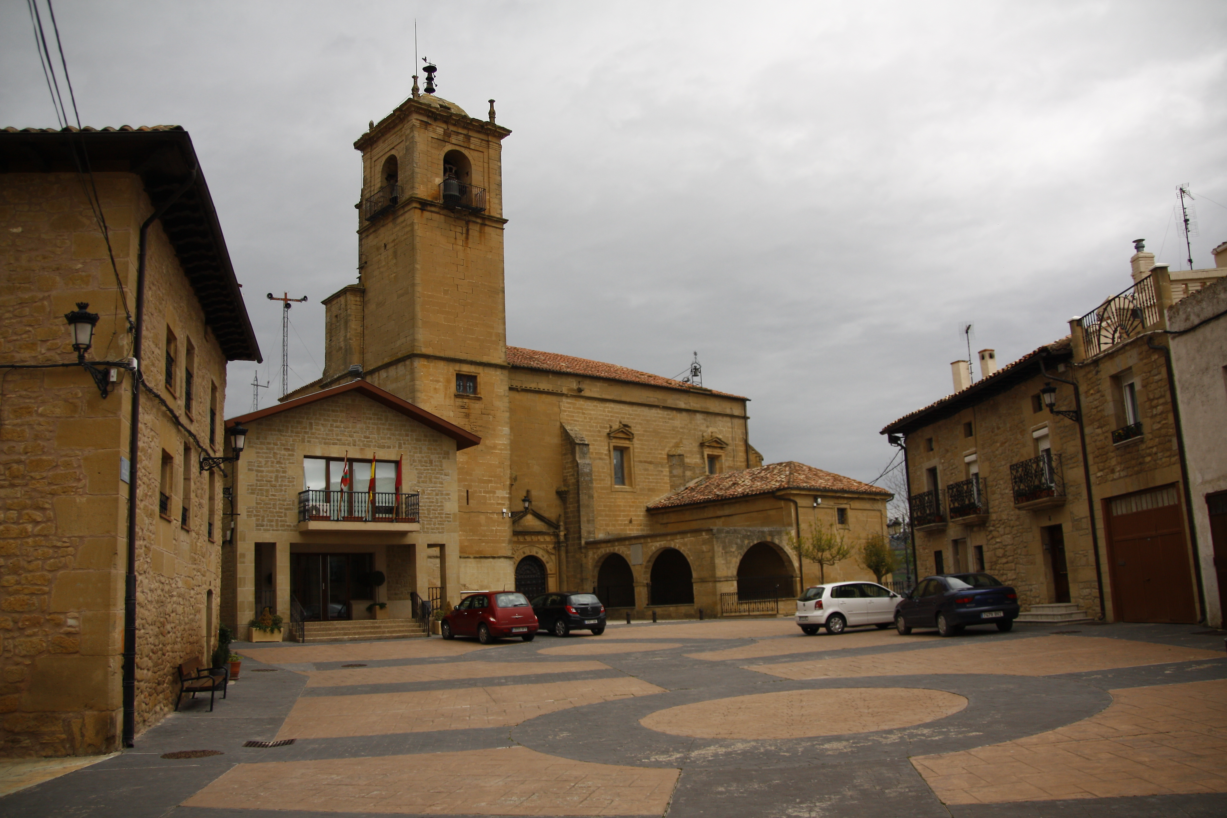 Arabar Errioxako Iekora herriko udala eta eliza.